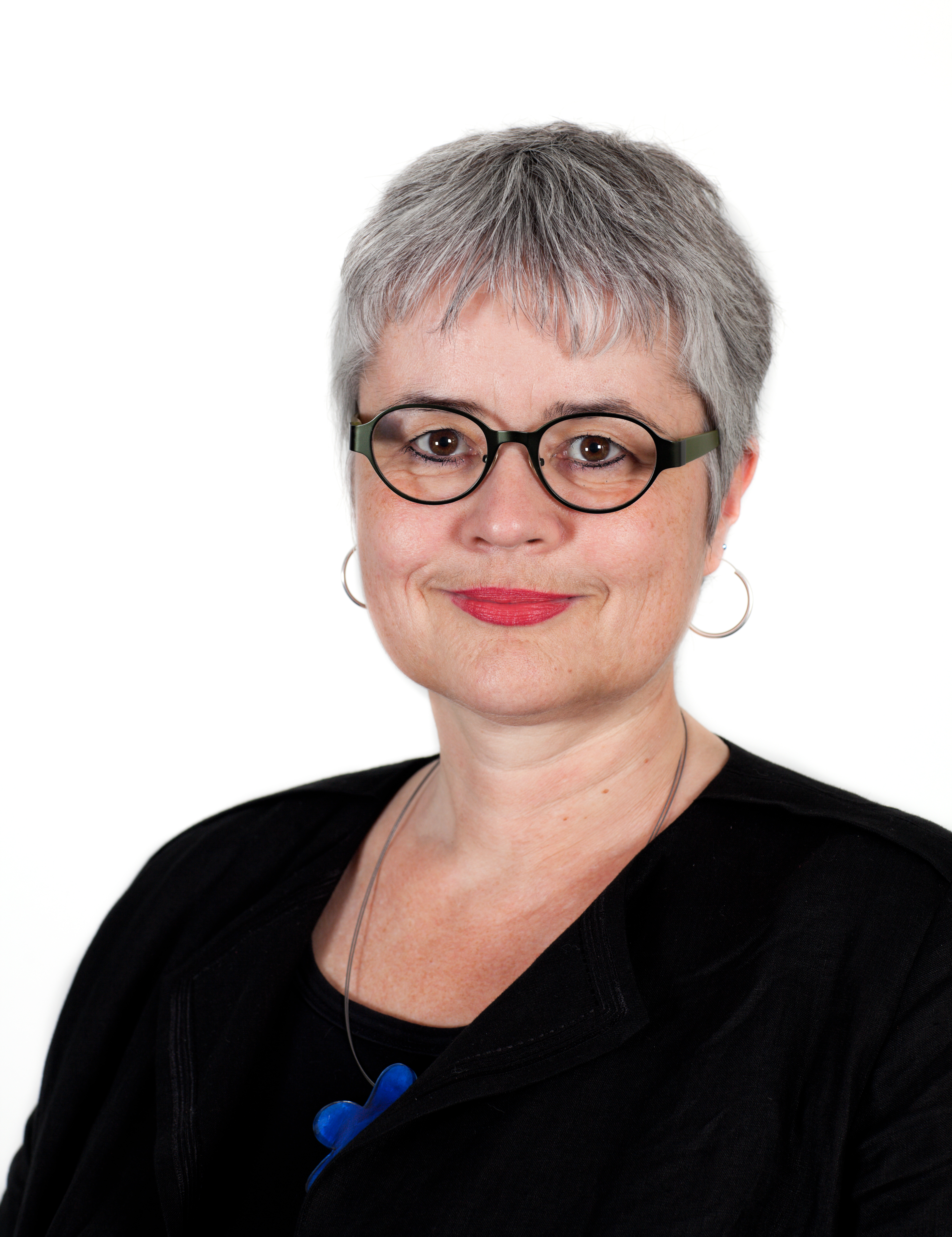 Poträtfoto von Kersten Artus (Die Linke), Mitglied der 20. Hamburgischen Bürgerschaft. Während des Projektes Hamburgische Bürgerschaft im Hamburger Rathaus.